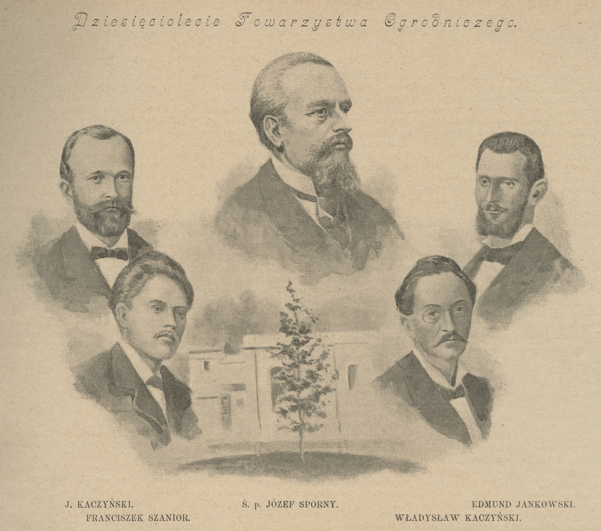 Dziesięciolecie Towarzystwa Ogrodniczego: Edmund Jankowski; J. Kaczyński; Władysław Kaczyński; Józef Sporny; Franciszek Szanior